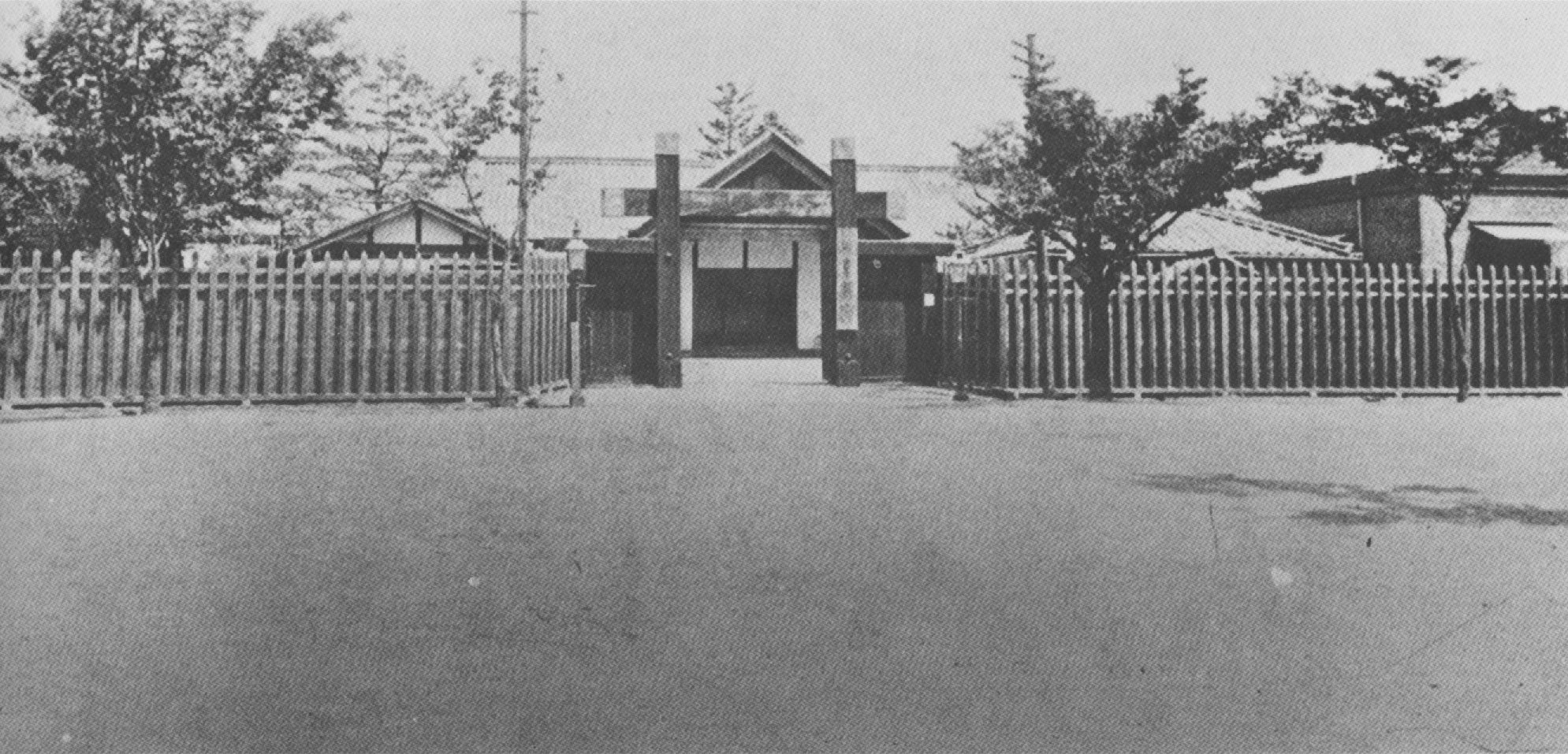 明治30年後半頃の岐阜県県庁。明治7年築、岐阜市司町